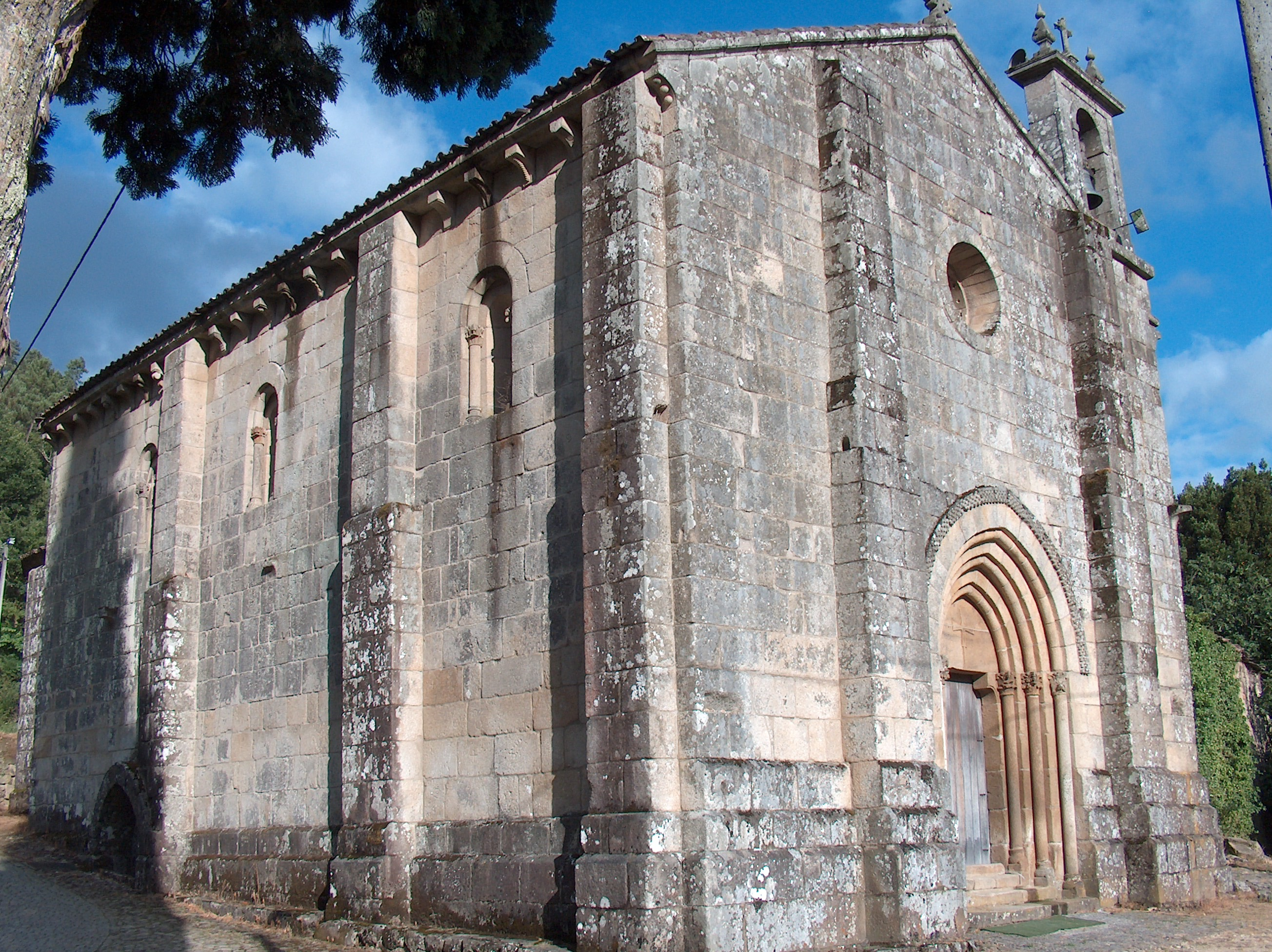 Igreja de Nossa Senhora da Conceição (Ermida). Ermida de Paiva, Castro Daire, Portugal.